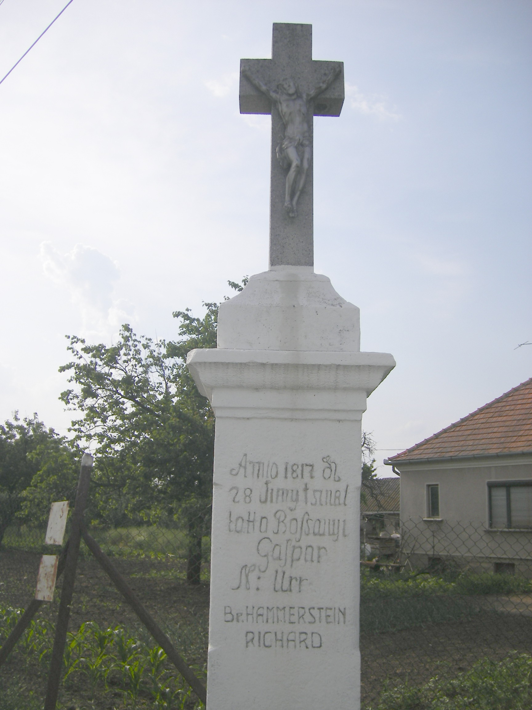 Csúz - kereszt 1817-ből